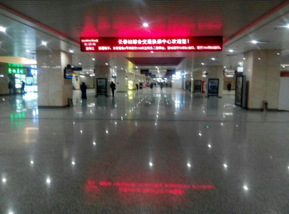 长春站综合换乘中心